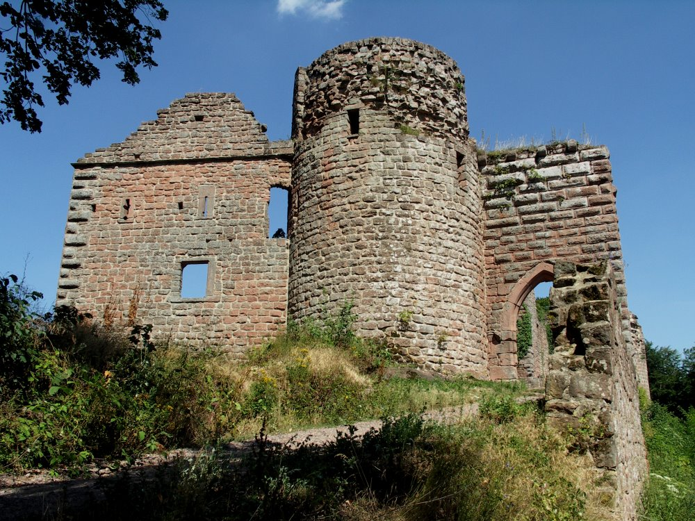 Neuscharfeneck, Ansicht des Torturms von aussen. Datum: 17.7.2005 Fotograf: Peter Schmenger